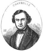 "La Commission de permanence de l'Assemblée nationale". (Détail : "CHAMBOLLE")